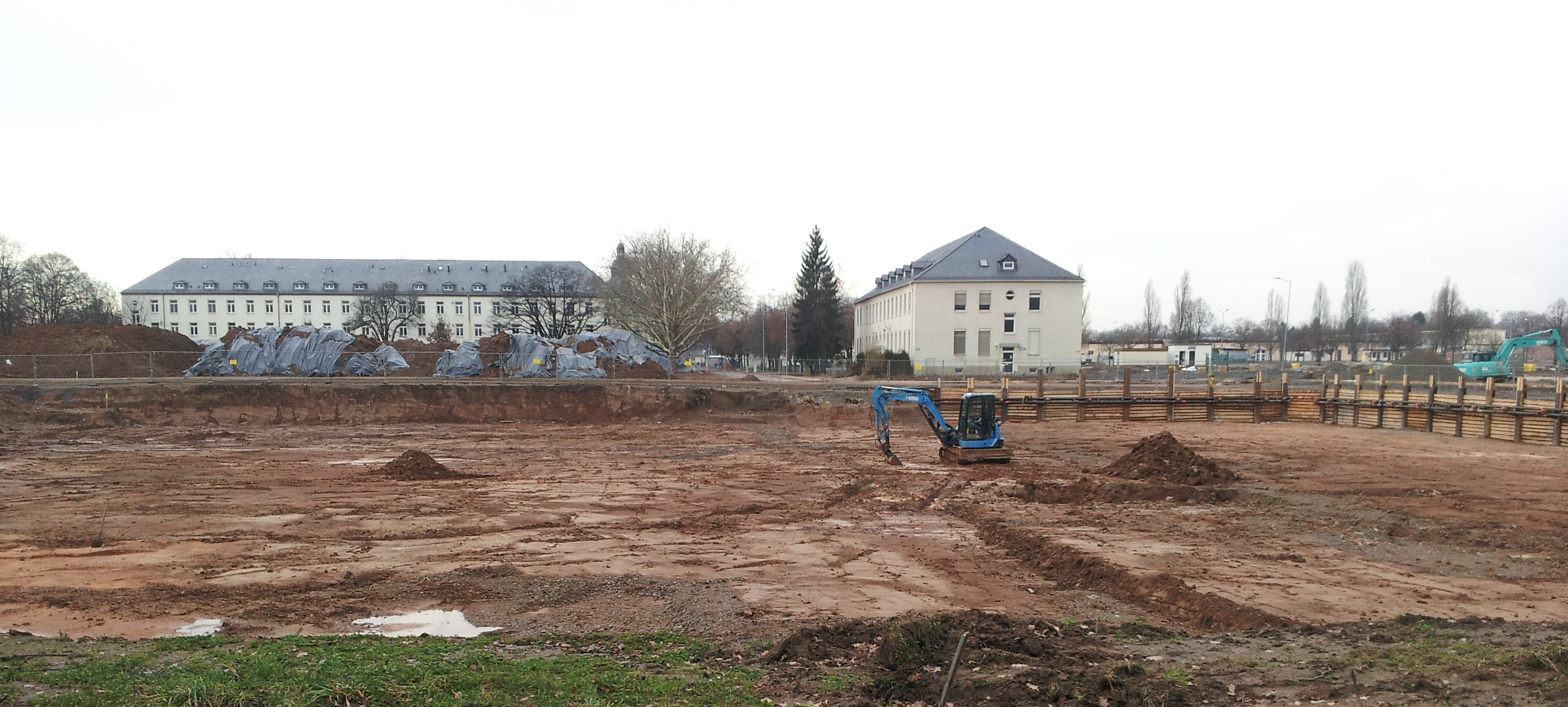 Die Baugrube des i-Campus Schweinfurt, gesehen von der Franz-Schubert-Straße aus.